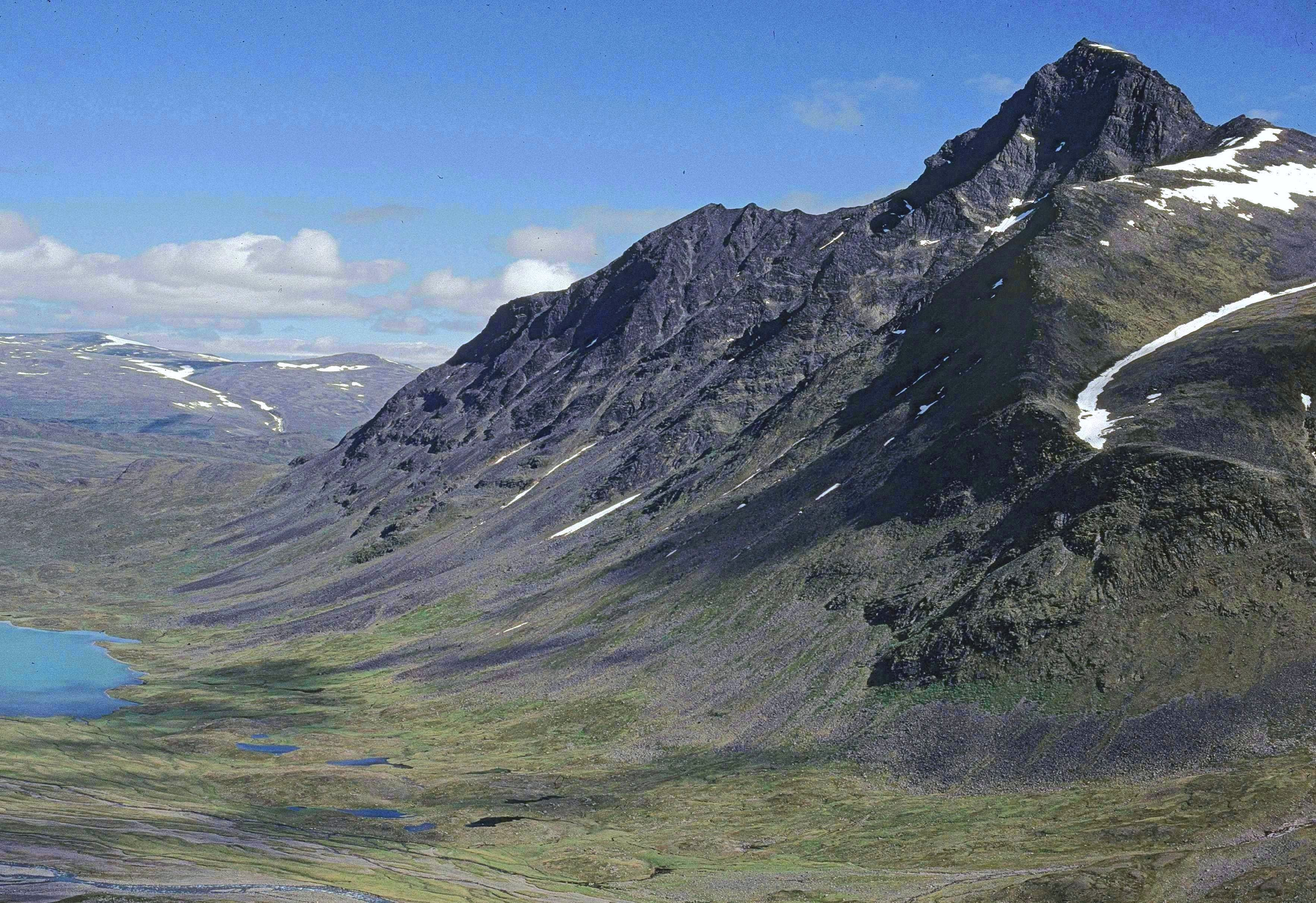 Pierikpakte i Sarek